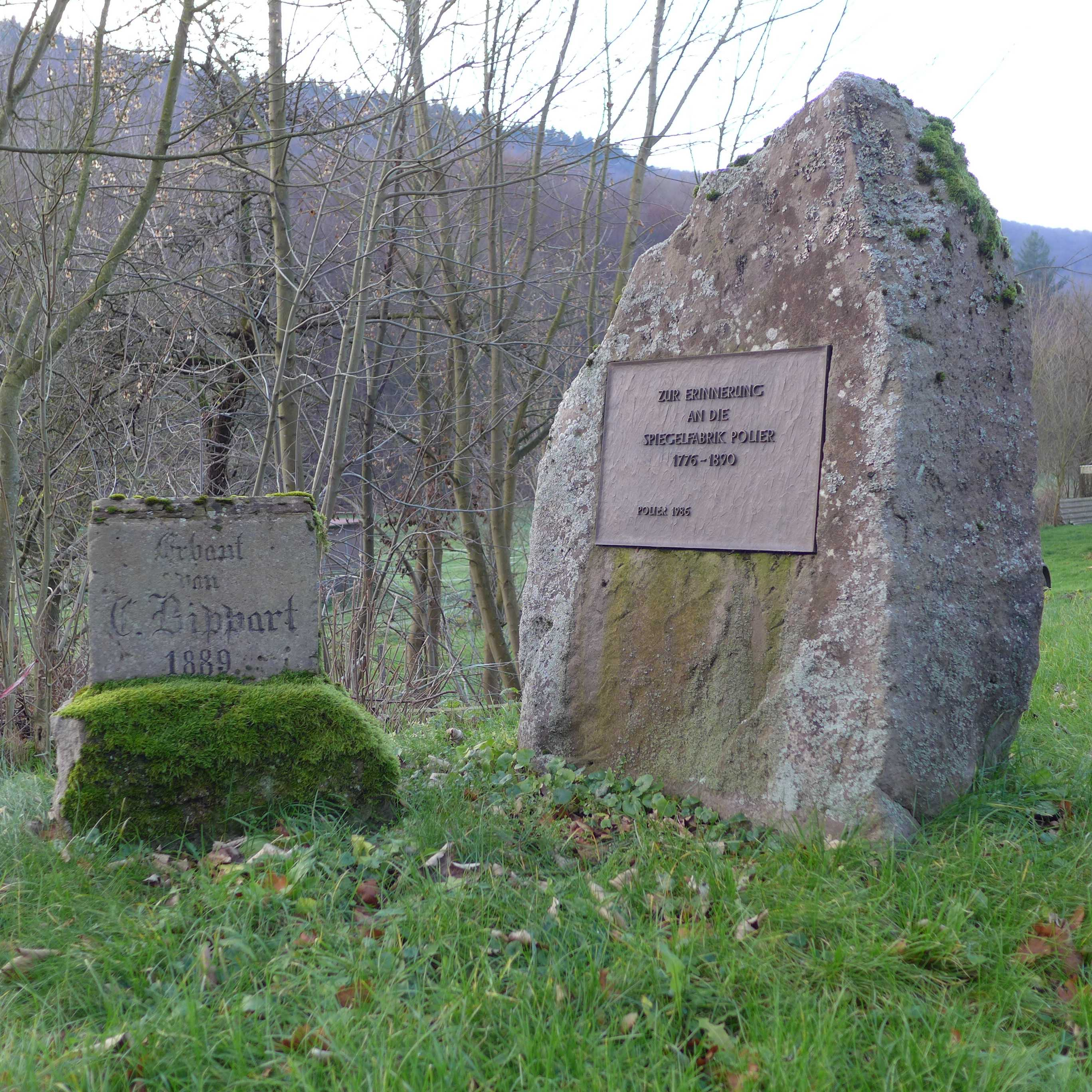 Steine an der Strasse bei der Ortschaft Polier